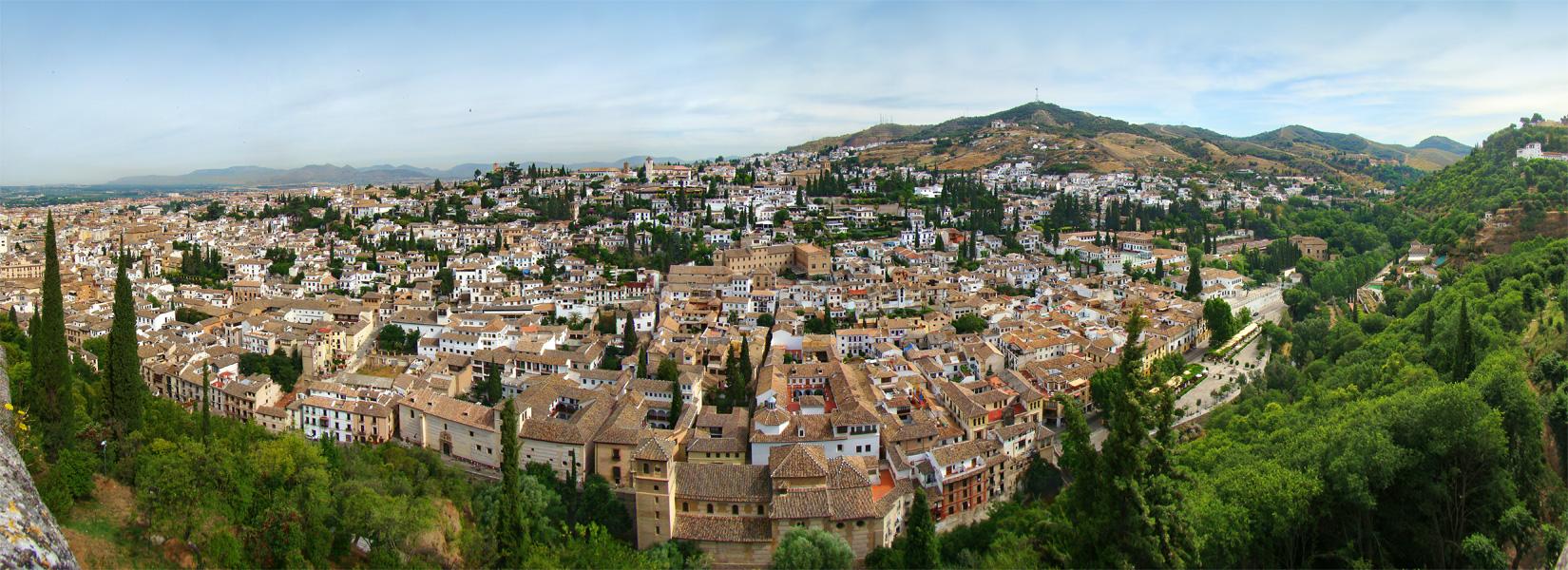 Vista panorámica desde la Torre del Cubo de la Alhambra, Granada, Andalucía, España.